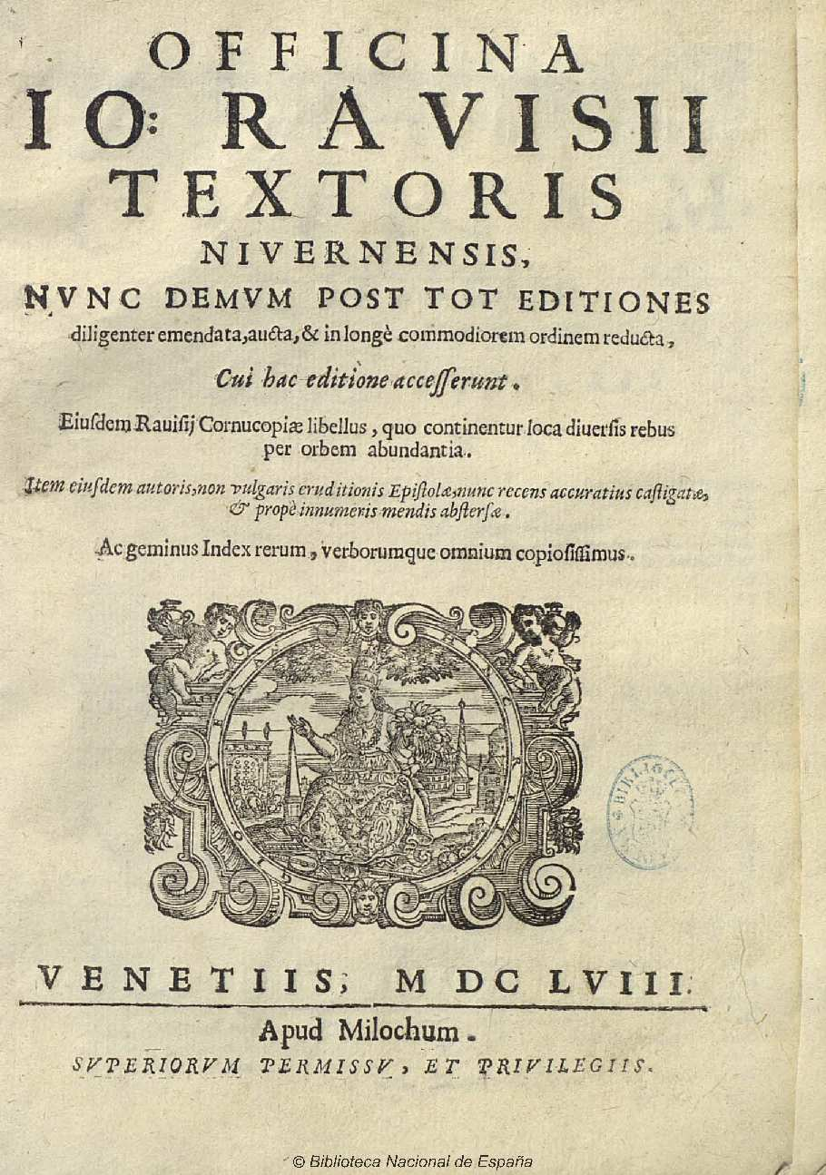 Portada de la Officina de Ravisio Textor editada en Venecia por Milochum, 1658. Biblioteca Nacional de España.